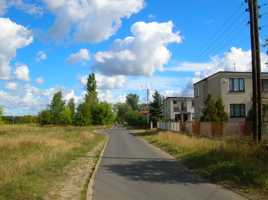 Osiedle Jachcice w Bydgoszczy